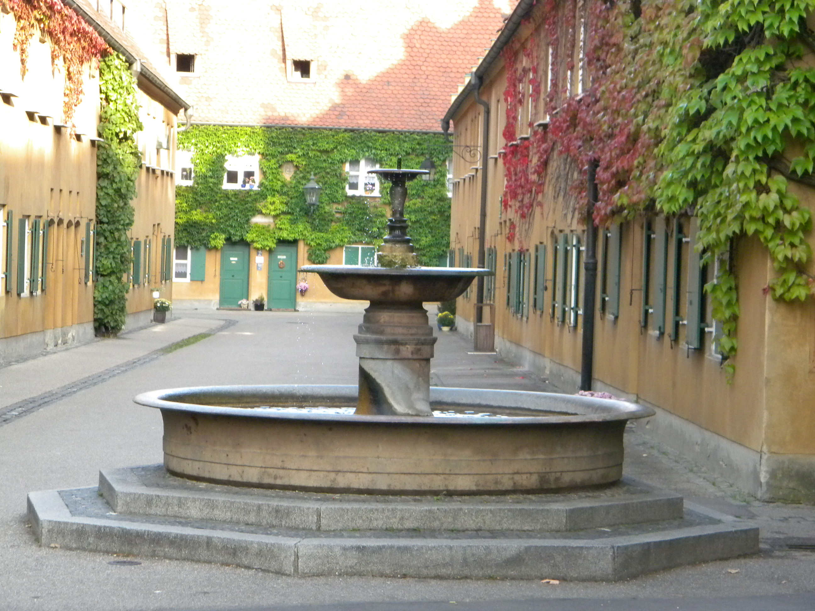 Чашеобразный источник в Фуггерай